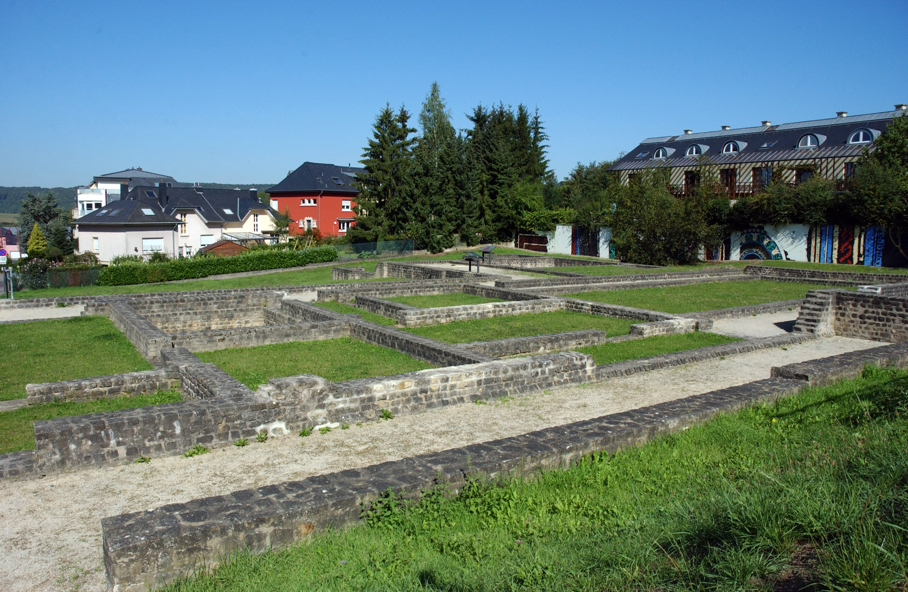 römische Villa von Helmsange